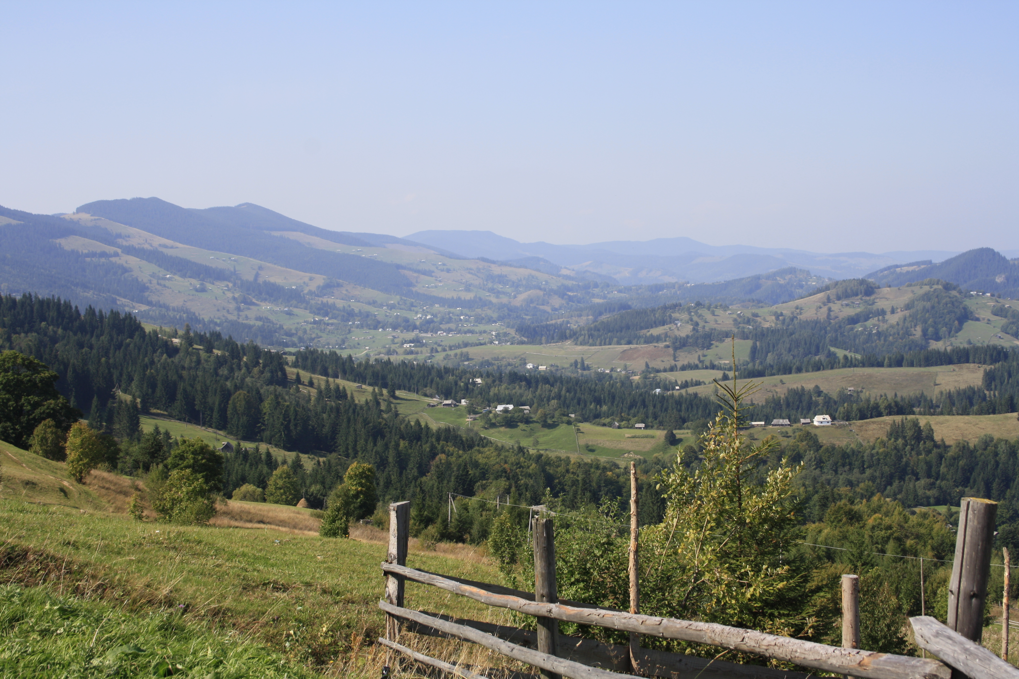 РЛП «Гуцульщина», Косівський район